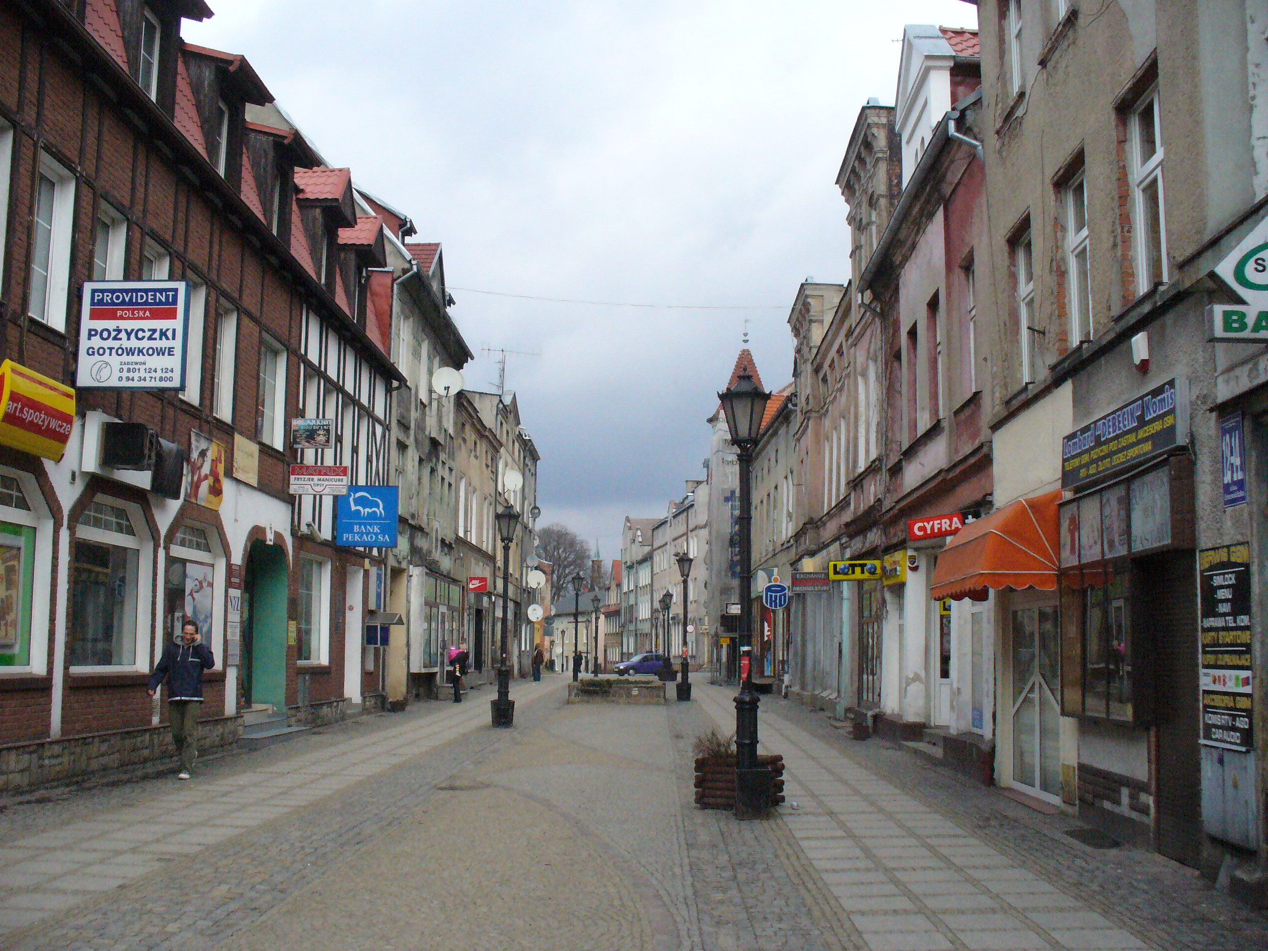 reprezentacyjny pasaż w centrum służy zarówno mieszkańcom jak i kuracjuszom